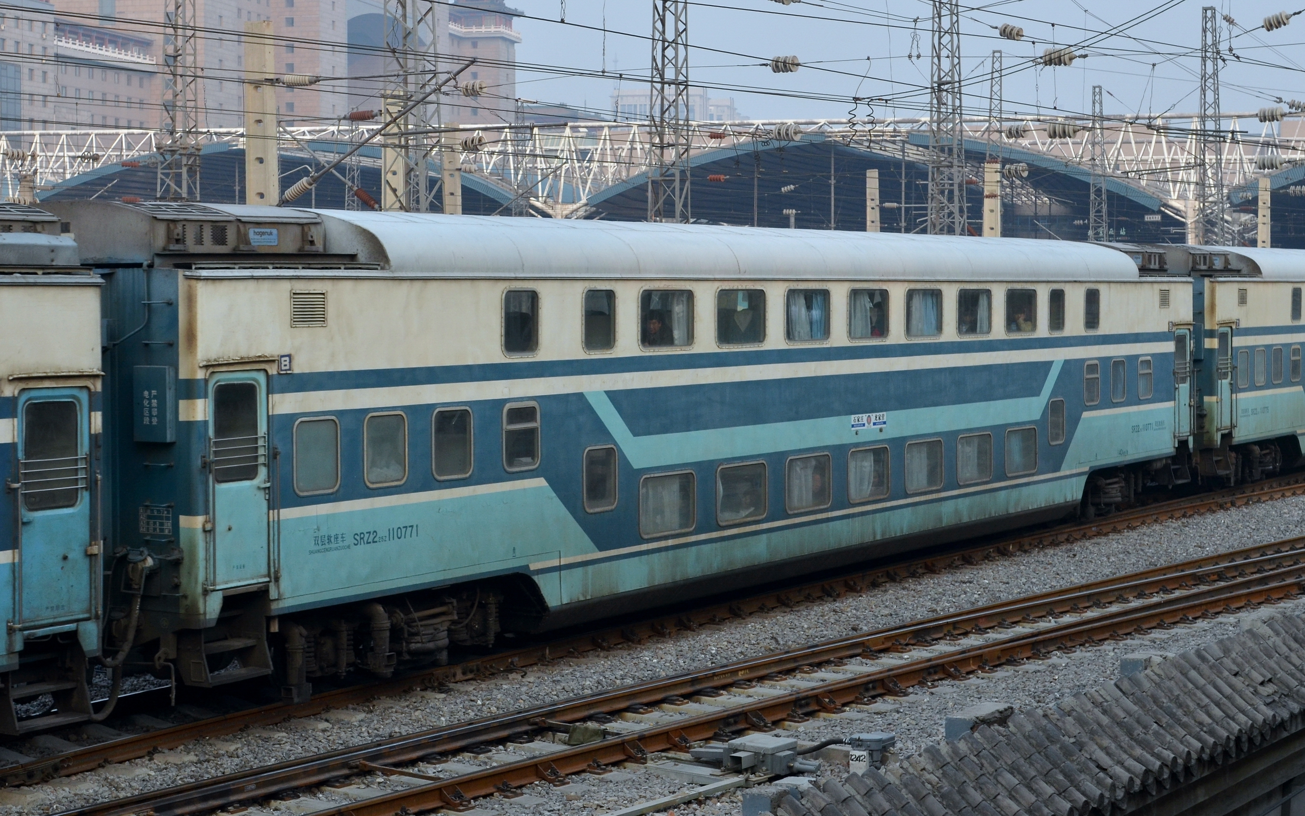 北京西至石家庄T5681次列车编组中的SRZ2 25Z双层软座车